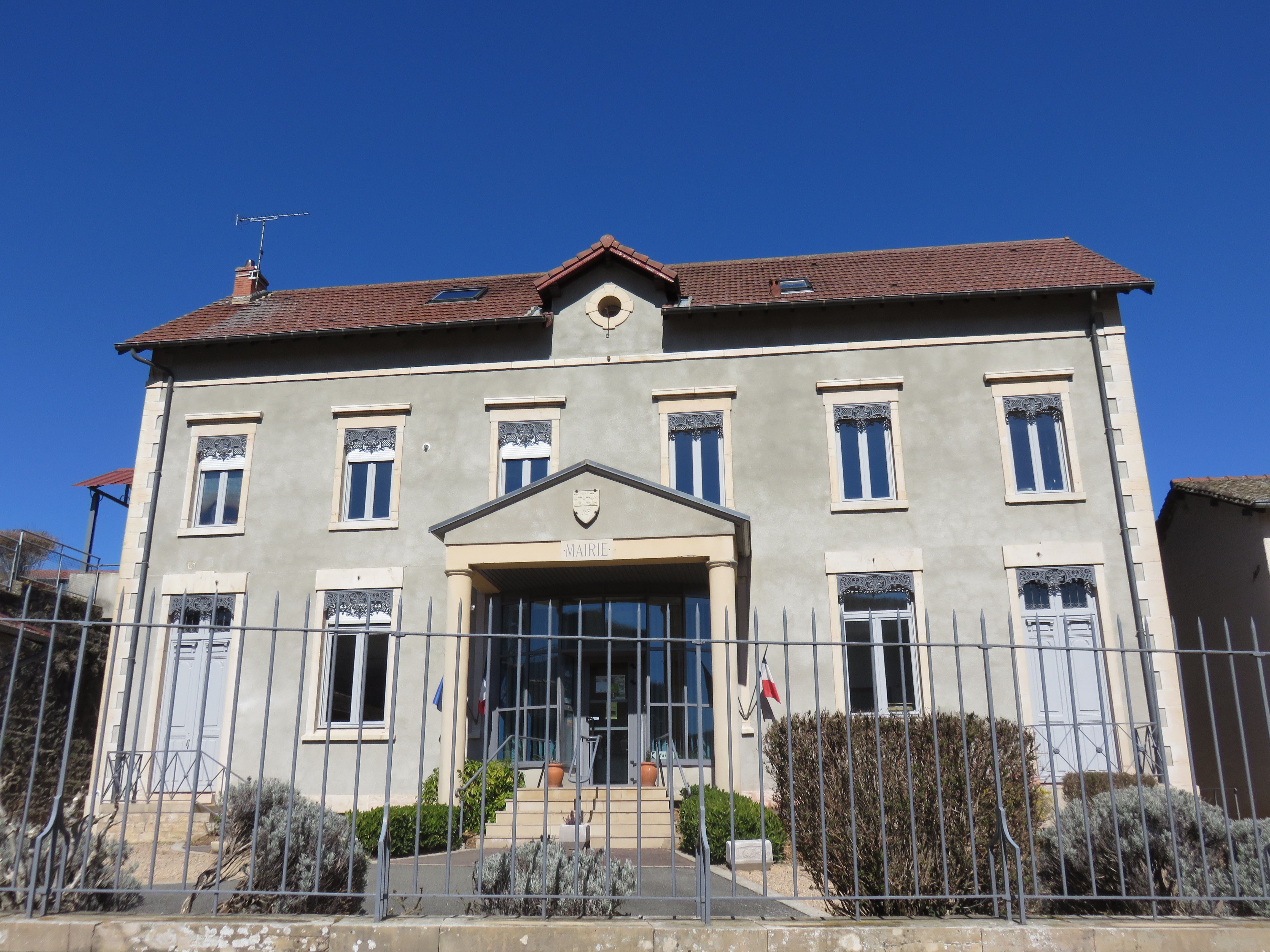 Vue de la mairie de Marchampt (Rhône, France).